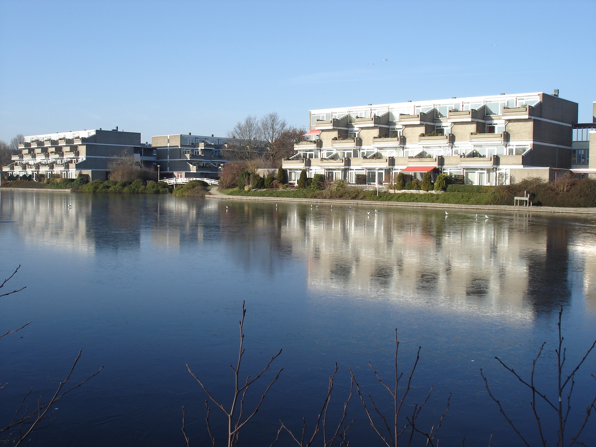 Woningen aan het water in de Zwolse woonwijk Aa-landen.